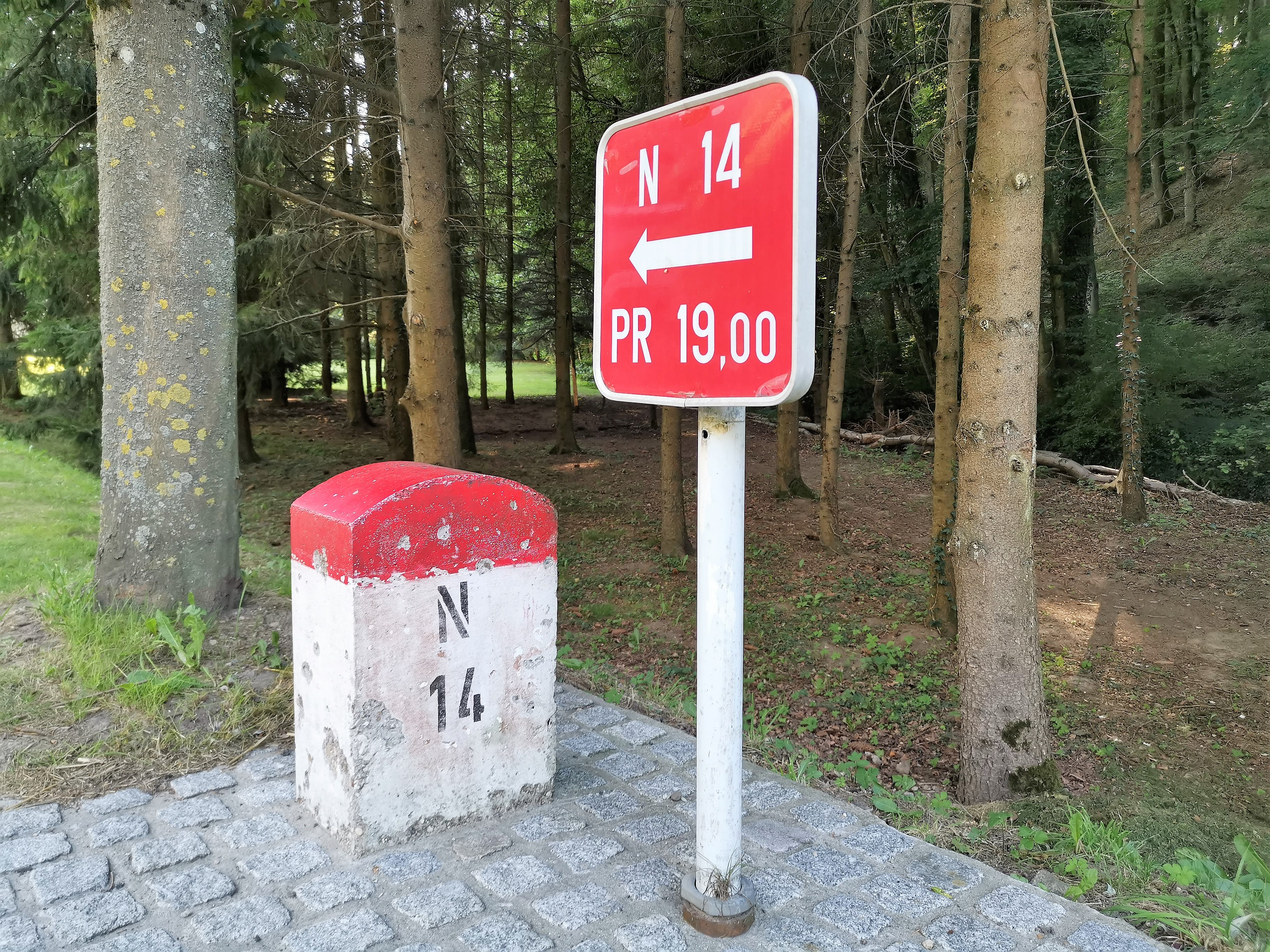 Borne kilométrique N14 et panneau à Blumenthal.